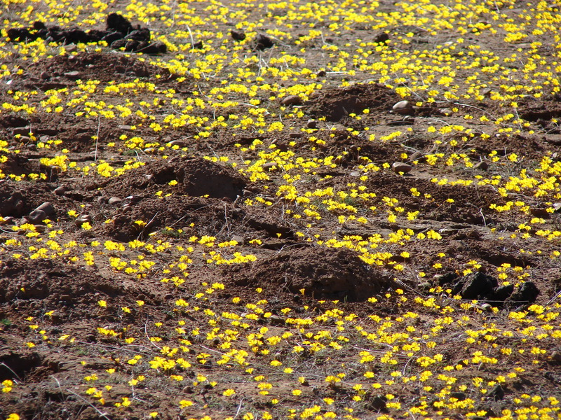 alimento para los inefables ratones topos "Cururos" (Spalacopus cyanus).